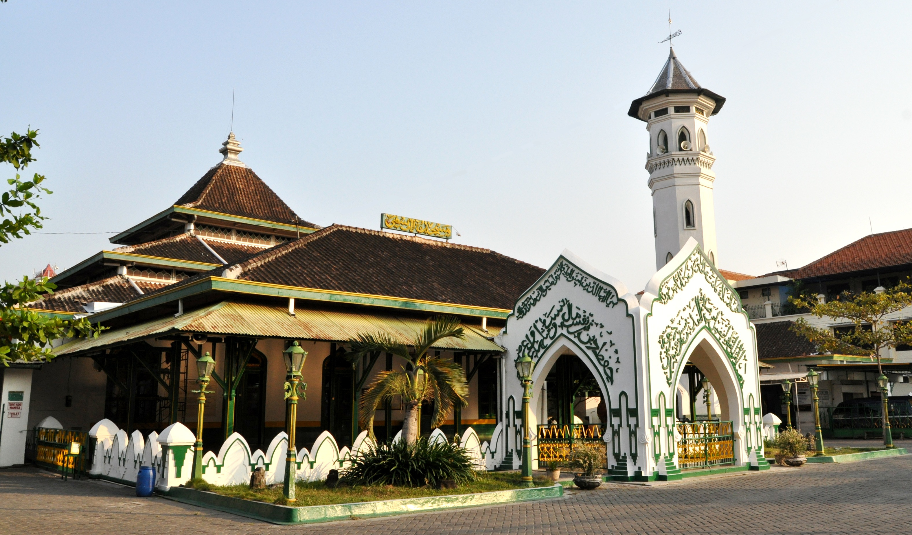 Tampak tenggara masjid memperlihatkan minaret, sebagian atap pendopo, dan tiga trap/lapis atap ciri khas bangunan tajug. Puncak tidak menggunakan kubah, ciri khas masjid kuna di Jawa.